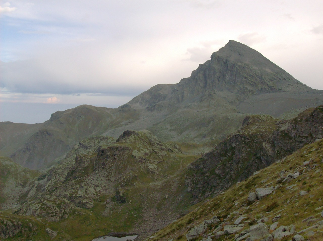 Viso Mozzo visto da Nord